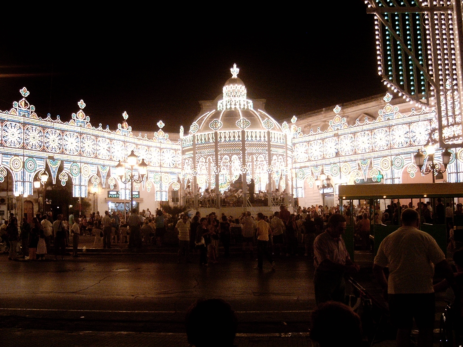 Piazza Vittorio Emanuele II luminarie